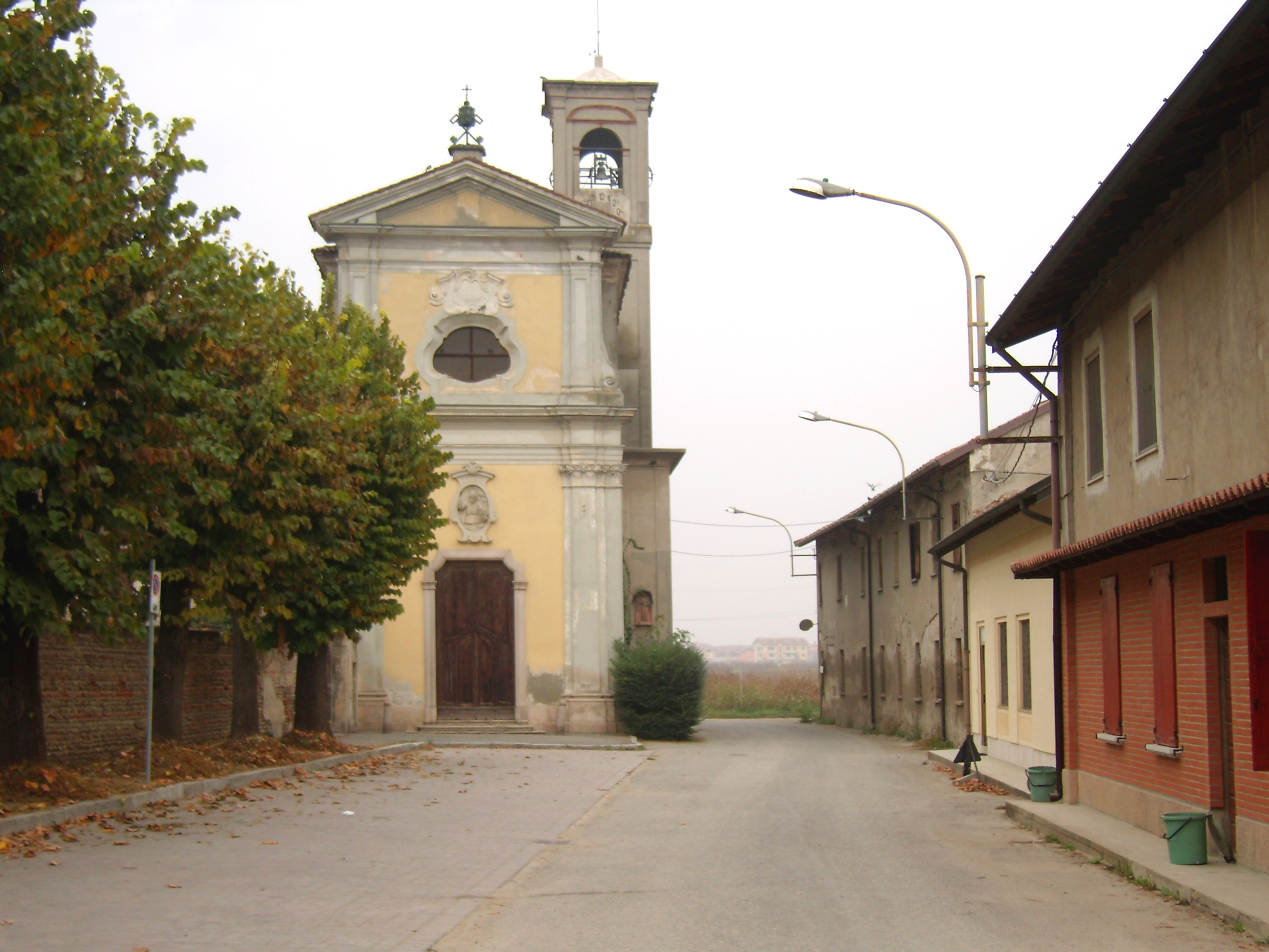 Chiesa di San Pietro a Casolate, frazione di Zelo Buon Persico.